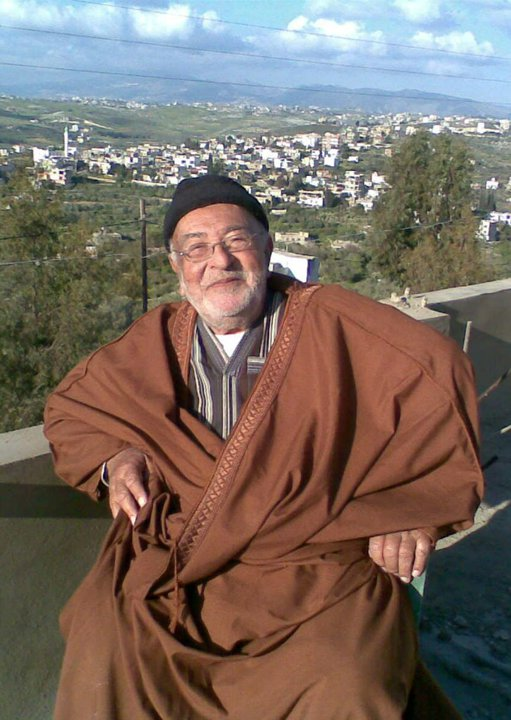 الحاج عبد الحسن عميص - أحد مديري مدرسة عبا الرسمية